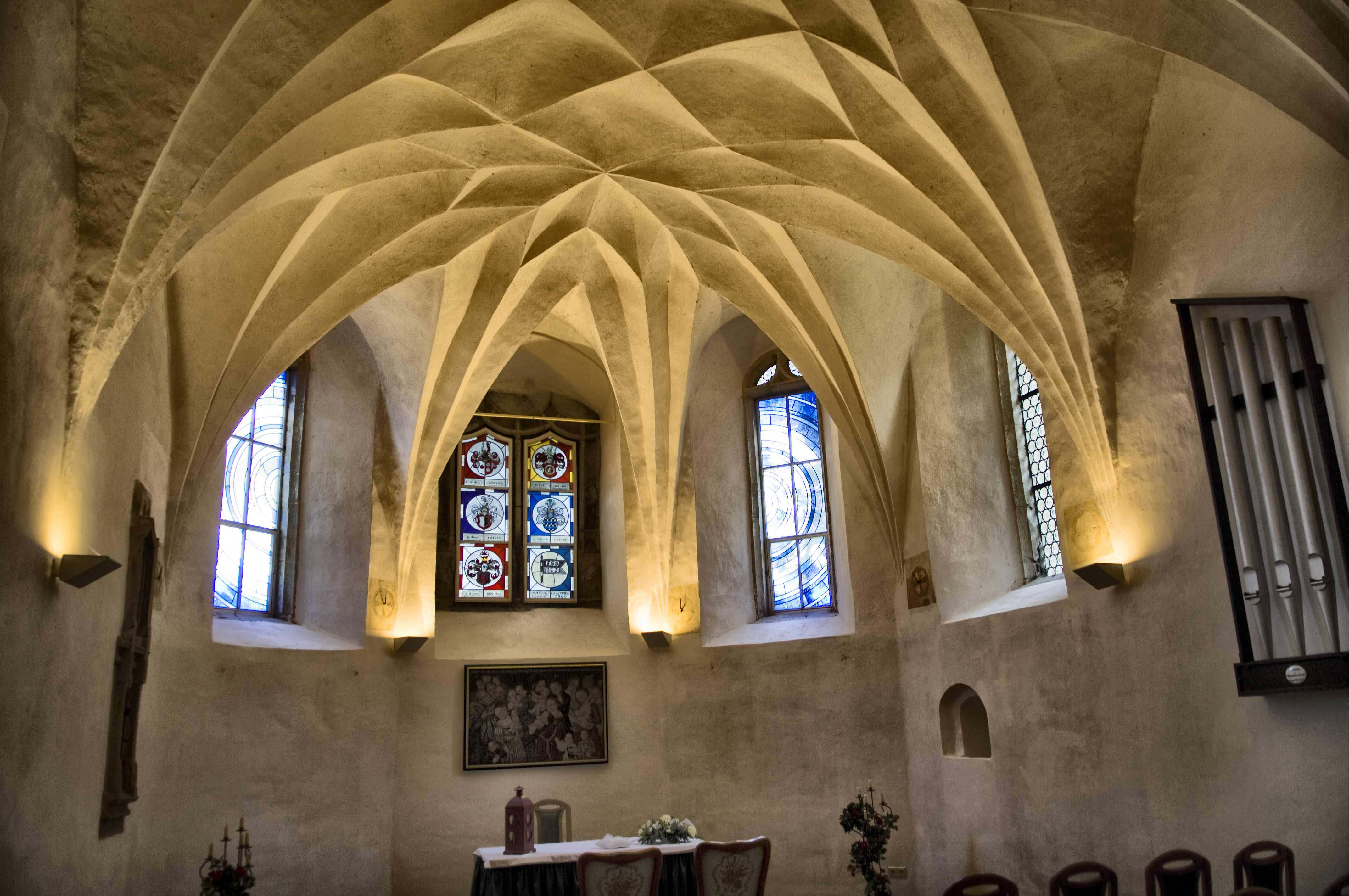 Gotische Kapelle in Schloss Schleinitz bei Leuben-Schleinitz mit Kirche